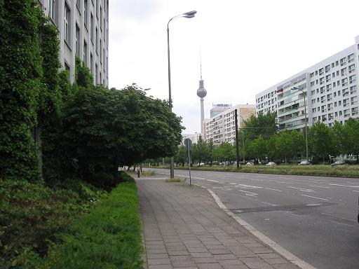 Otto Braun Straße, Berlin Berlin Mitte, nahe Alexanderplatz. Ehemalige Hans-Beimler-Str. Fernsehturm im Hintergrund. Selbst fotografiert, Juli 2004 GNU FDL